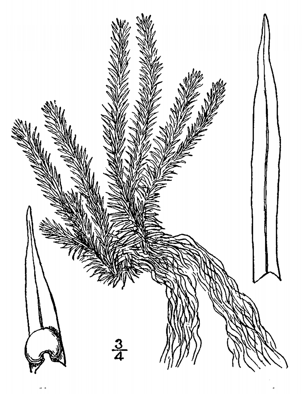 Rock firmoss (Huperzia porophila)